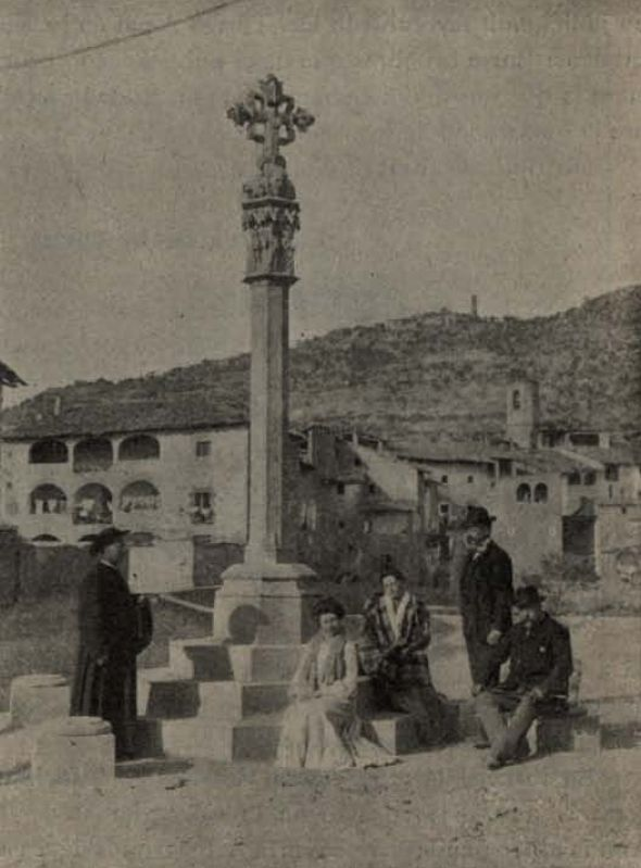 Antiga Creu de terme de Torà amb la torre del castell de l'Aguda al fons